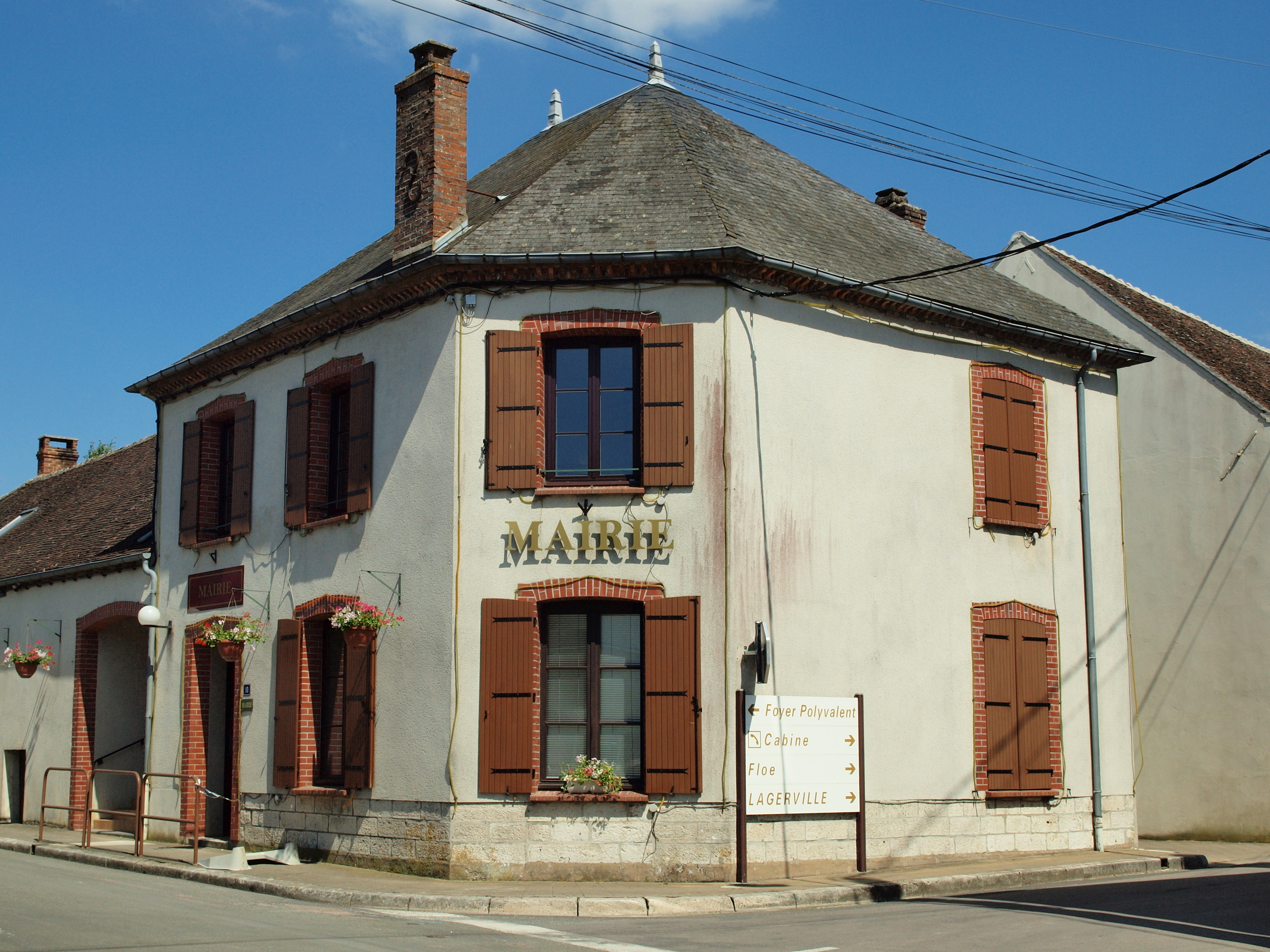 Mairie de Chaintreaux